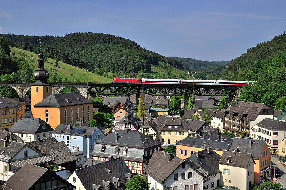 Metropolitan Zug über den Dächern von Ludwigsstadt - Trogenbachbrücke mit ICE 915 Berlin - München der planmäßig mit Metropolitanwagen verkehrte, Triebfahrzeug war 101 130.